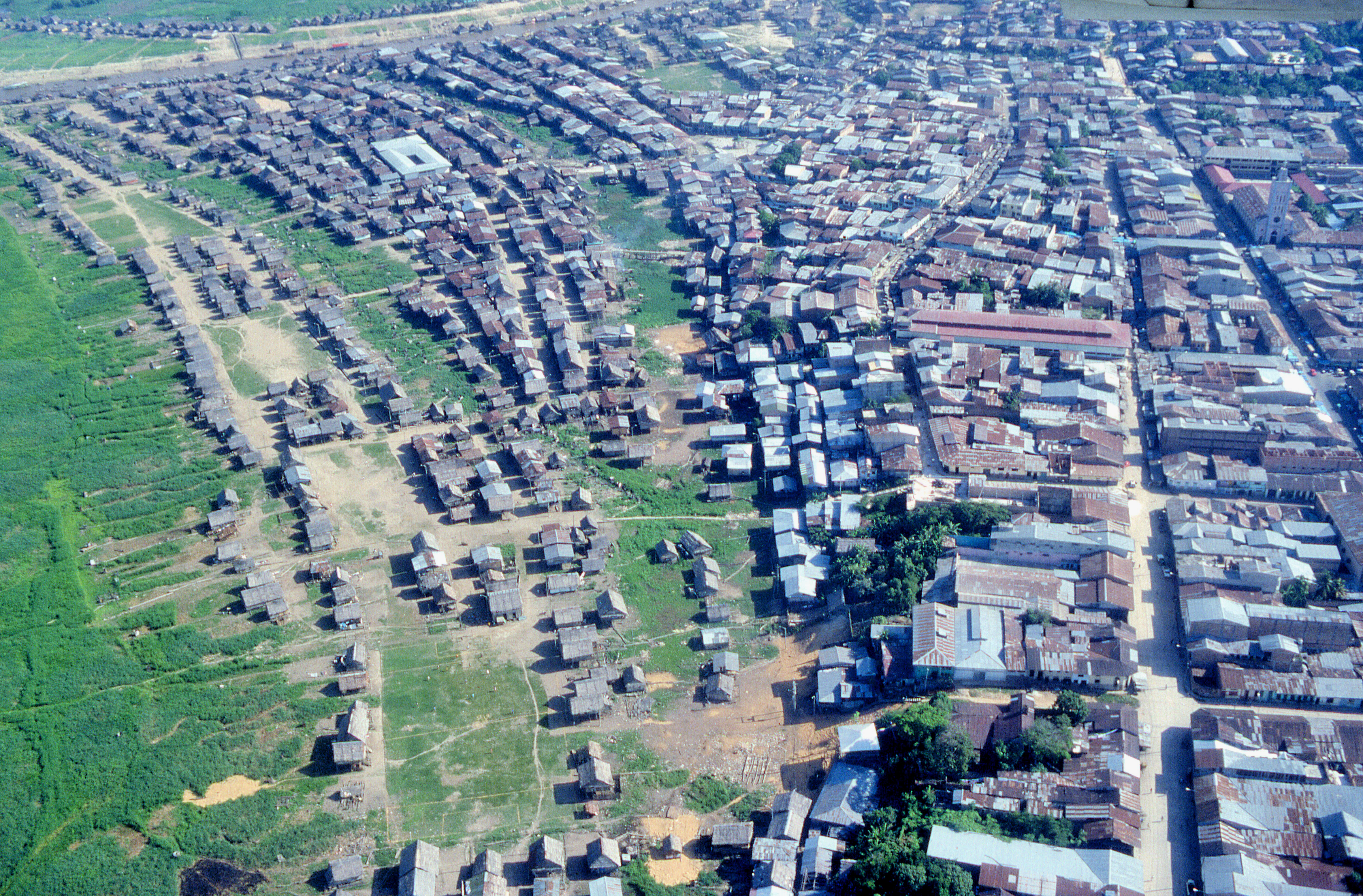 Iquitos_et_l'Amazonie_979.jpg perou